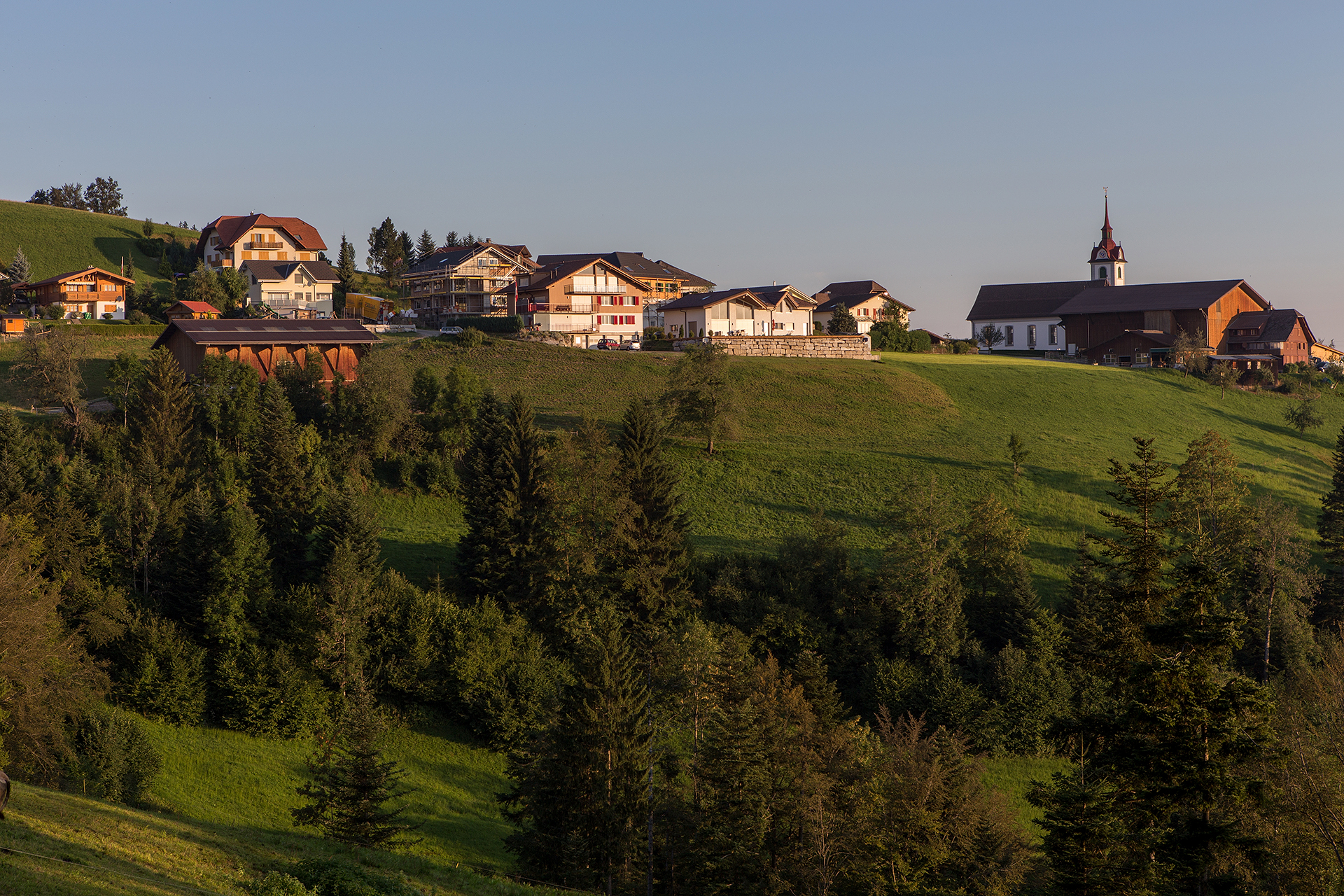 Menzberg (LU), Gemeinde Menznau